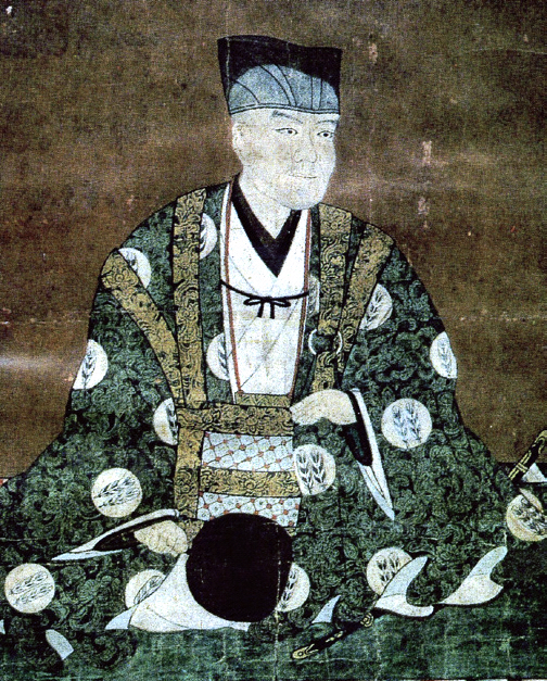 赤星統家の肖像。